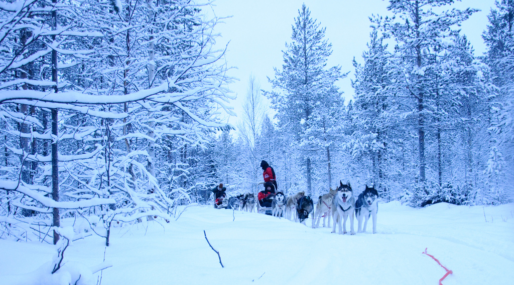 Husky safaria Lappin